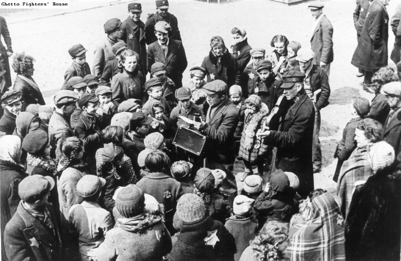 Jankiel Herszkowicz i akompaniujący mu Karol Rozencwajg